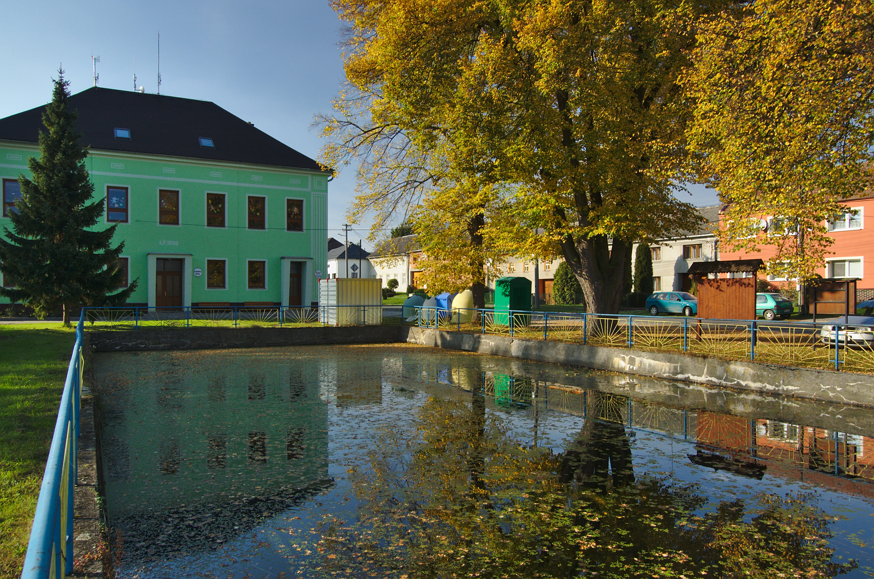 Rybník na návsi, Raková u Konice, okres Prostějov